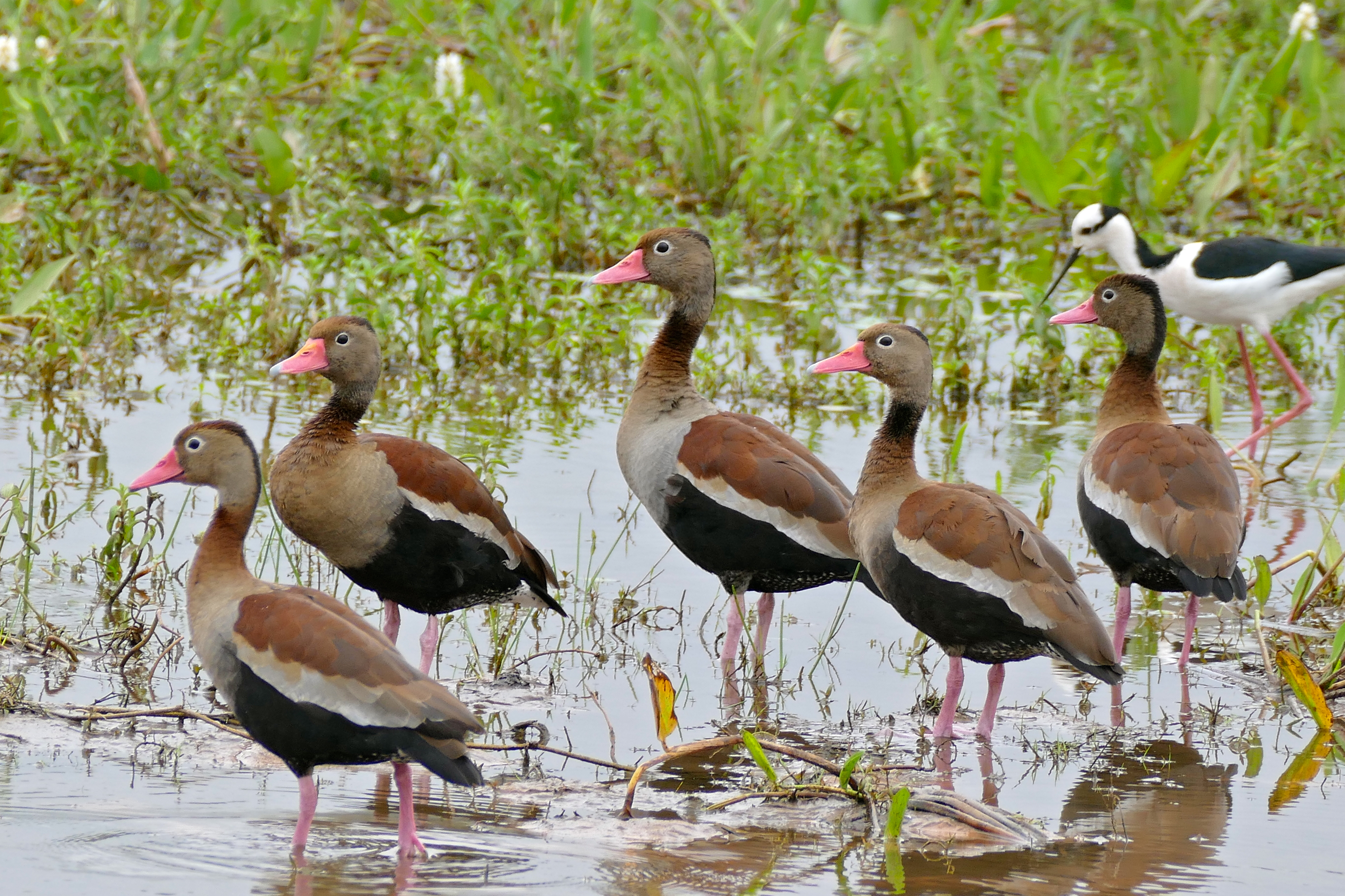 Transpantaneira, Poconé, Mato Grosso, BRAZIL